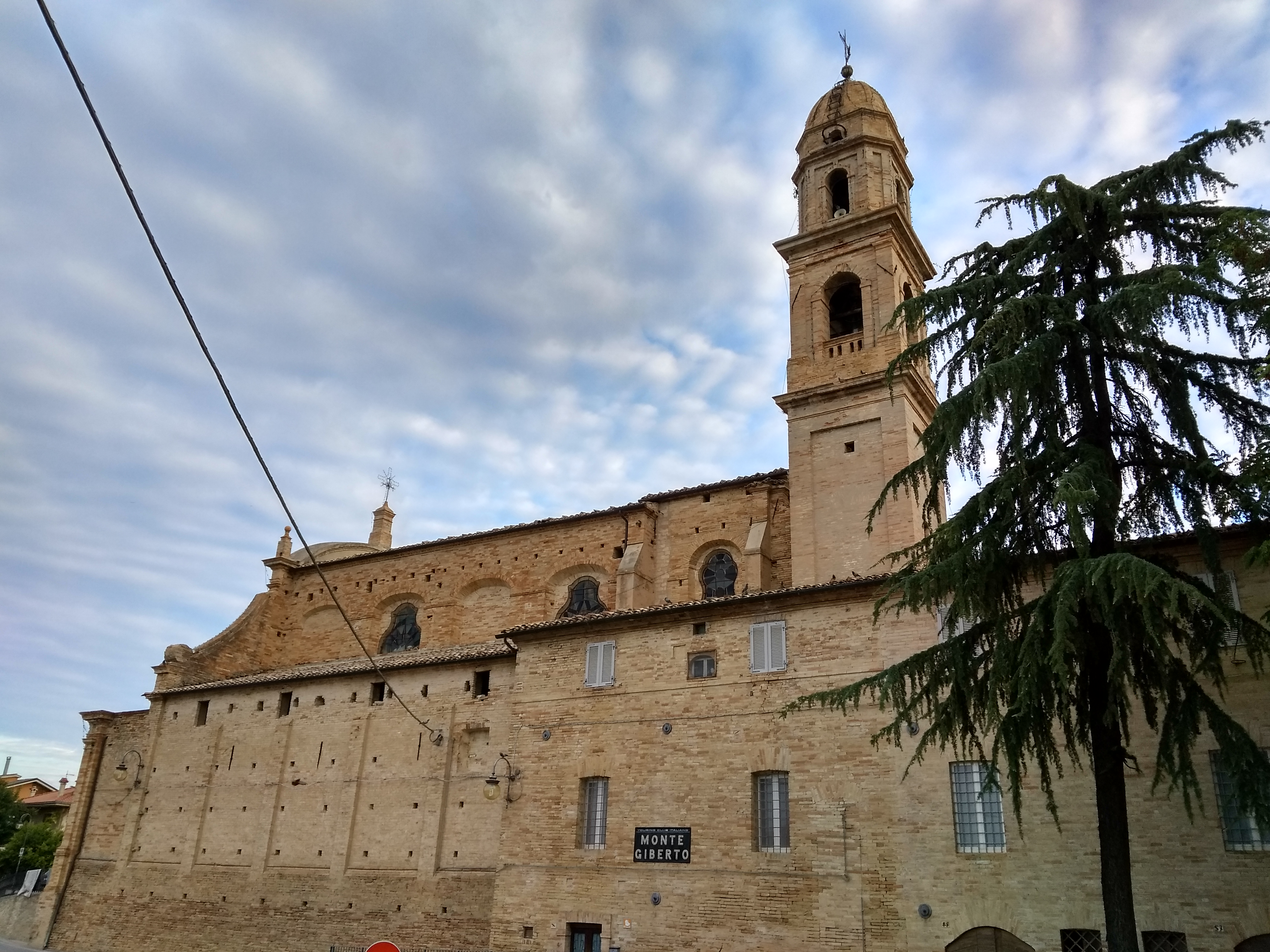 Santuario Madonna delle Grazie a Monte Giberto